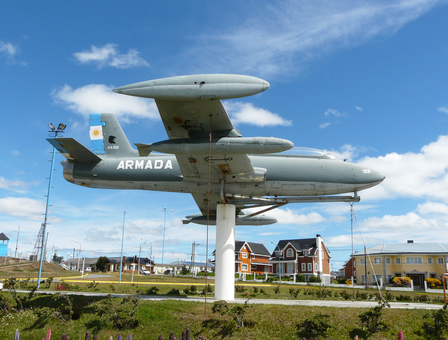 Aermacchi MB326GB 0647/4-A-108 (Msn 6540/281) Asignado a la 1ra Escuadrilla Aeronaval de Ataque de la Armada Argentina como 0647/4-A-108 en julio de 1972. Paso a ser 1-A-108 y 4-A-108. Tambien fue identificado erronamente como 0620/3-A-108. Desactivado e instalado como monumento en la ciudad de Rio Grande (Tierra del Fuego) el 01nov99